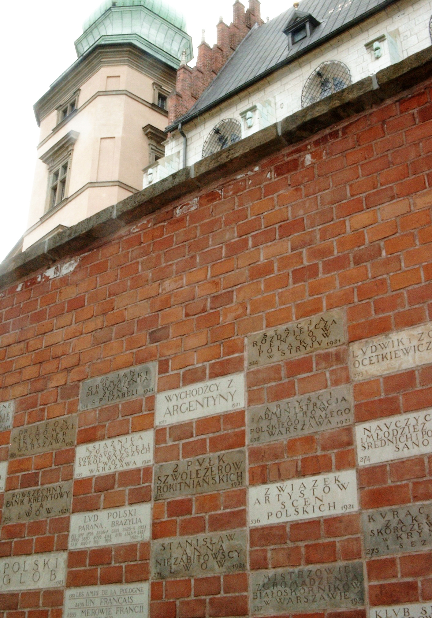 Le mur avec les noms des personnes qui ont finance la renovation du Wawel (debut du XXeme siecle)